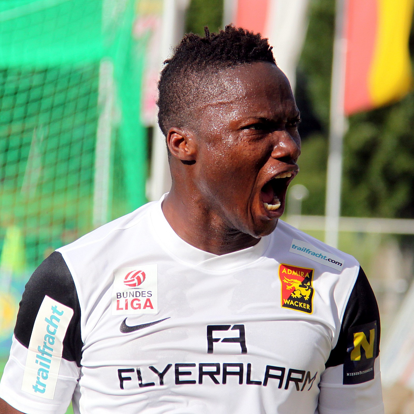 Meisterschaftsspiel der österreichischen Bundesliga: SV Mattersburg gegen FC Admira Wacker Mödling am 26. Mail 2013 (0:0)] im Mattersburger Pappelstadion.] - Das Foto zeigt.